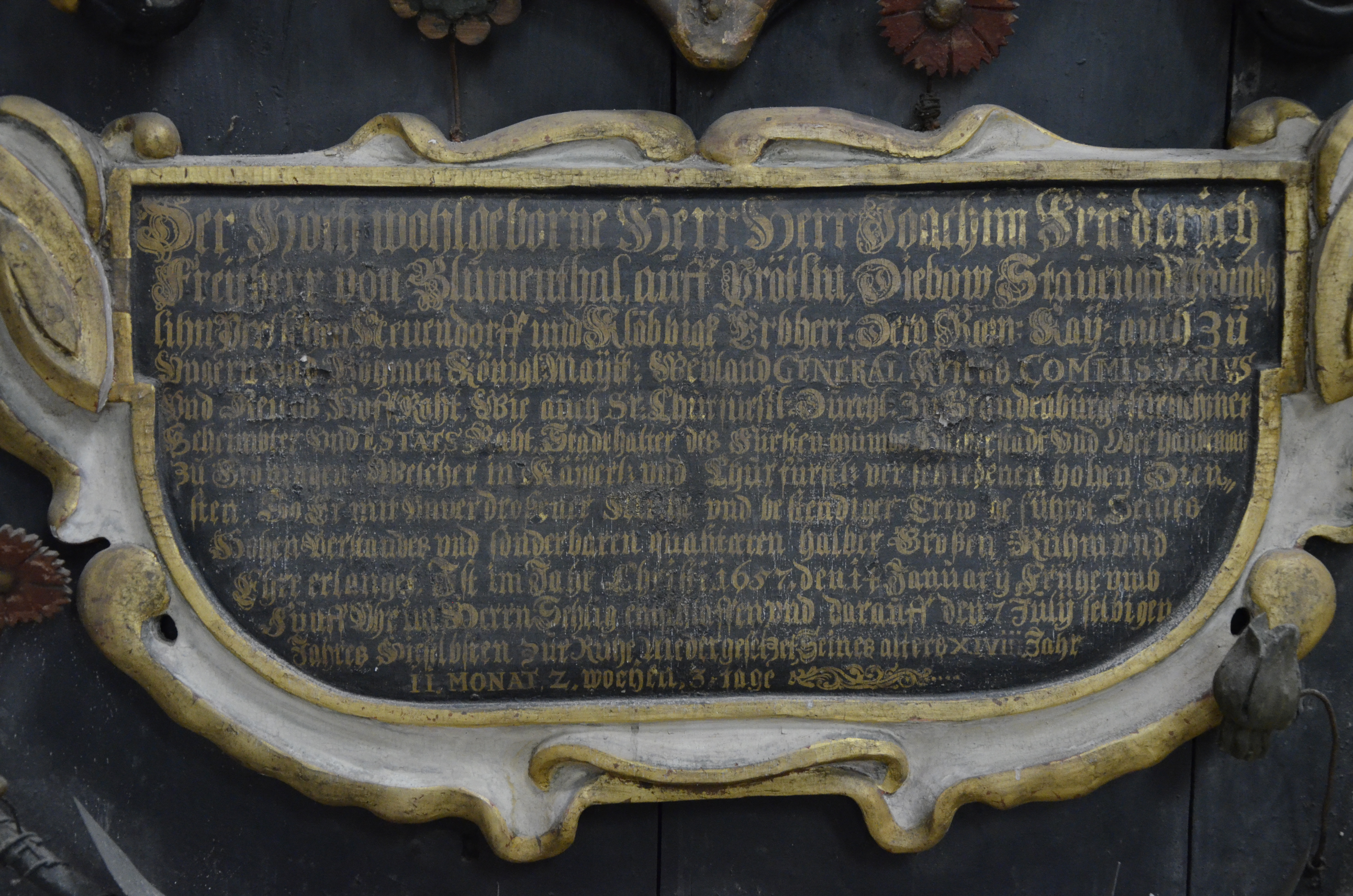 Epitaph, Blumentahl, Dom Halberstadt